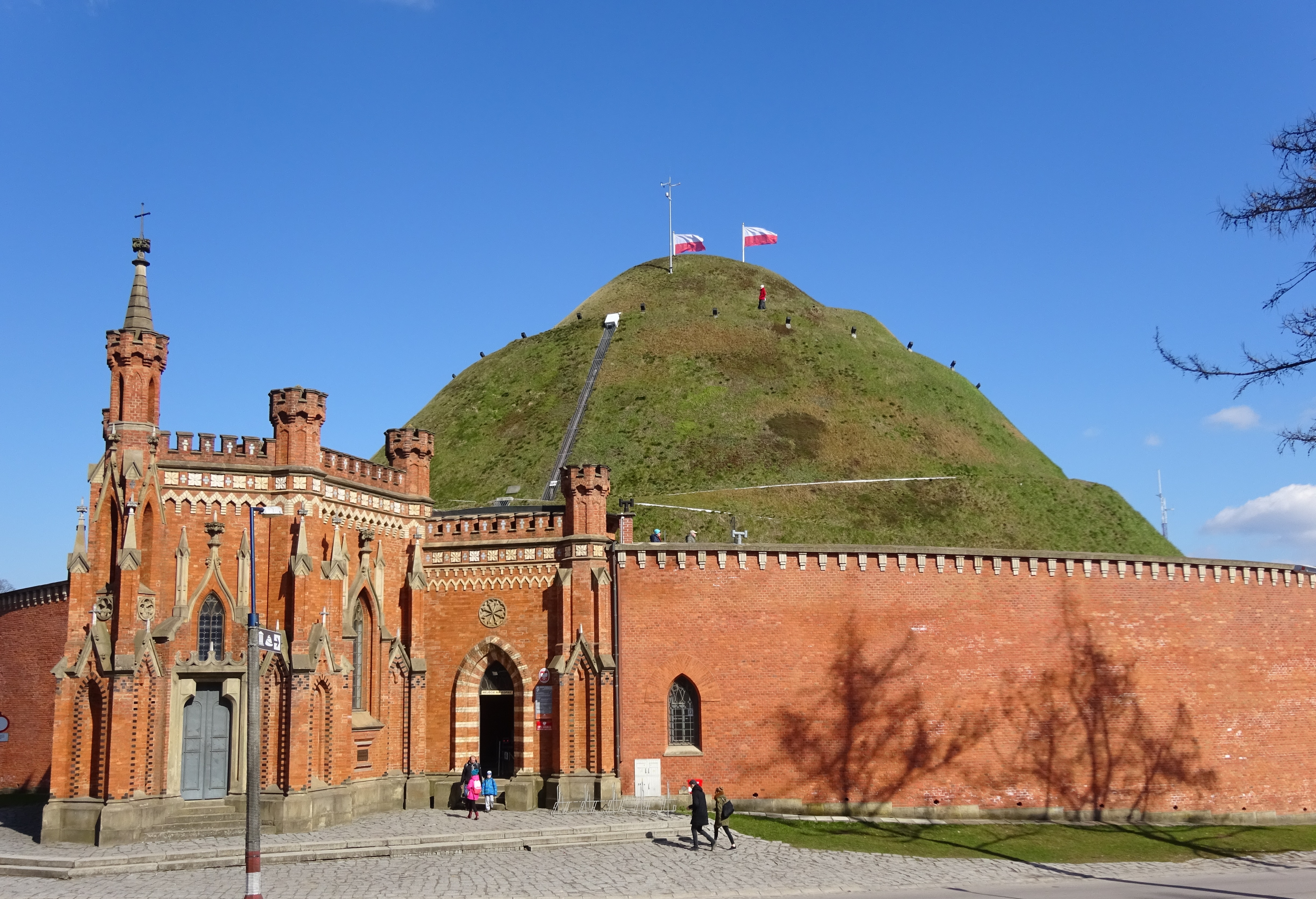 Kopiec Kościuszki oraz Kaplica bł. Bronisławy w Krakowie na wzgórzu Sikornik. 2016